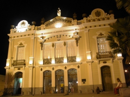 Teatro Alberto Maranhão em Natal, Brasil.